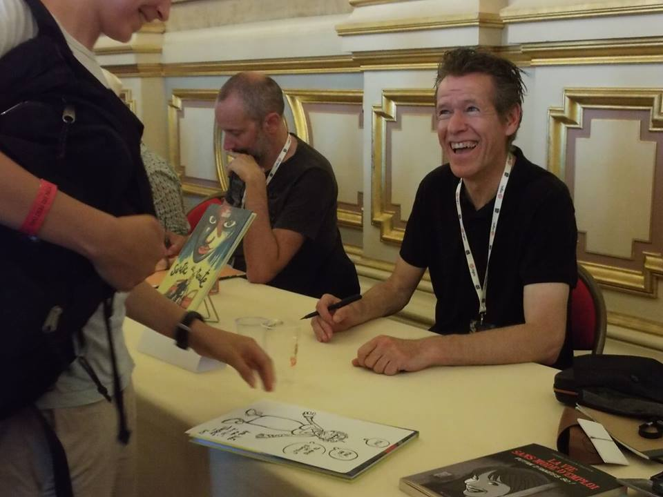 Didier Tronchet, au festival BD de Lyon, juin 2017